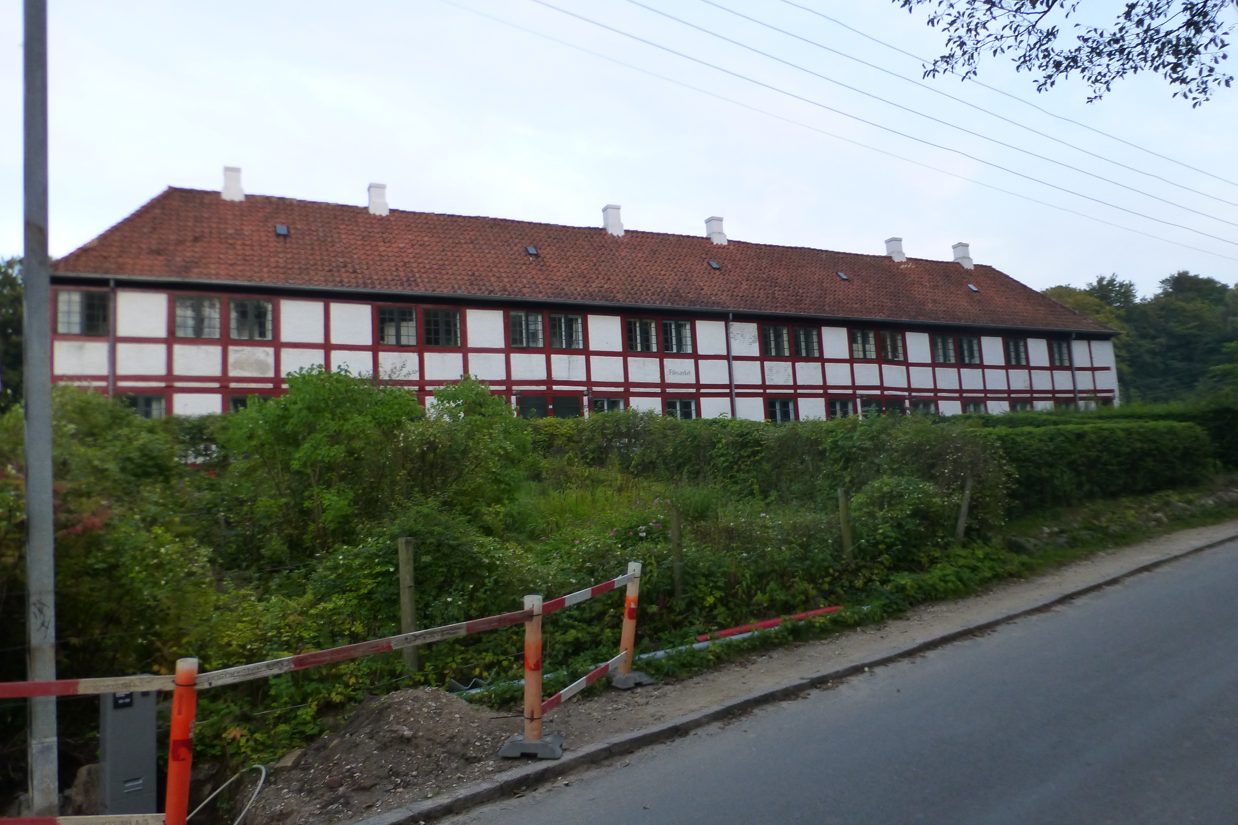 Raadvad fabrikker ved Mølleåen